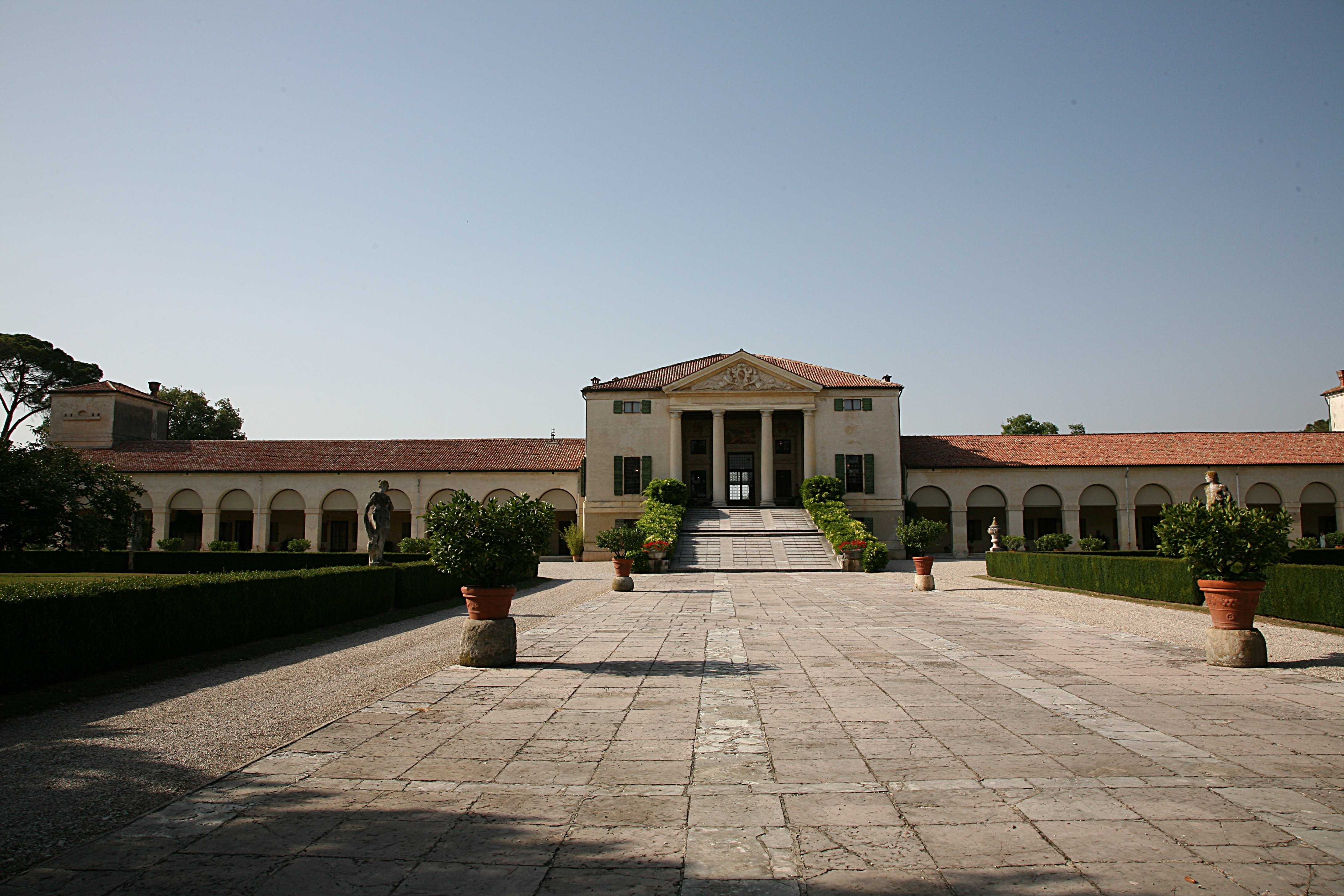 Villa Emo by Andrea Palladio.